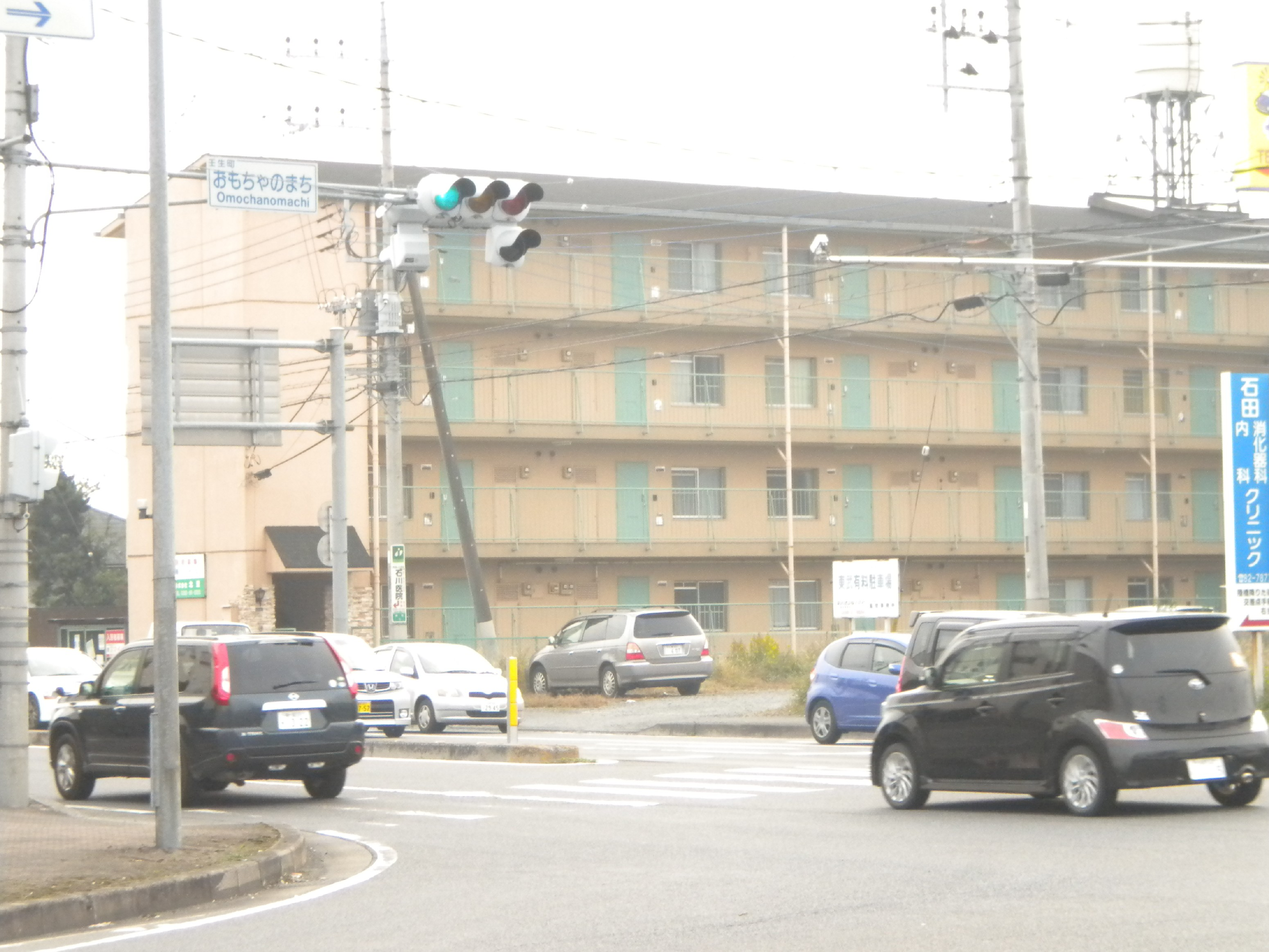 おもちゃのまち交差点（栃木県道2号宇都宮栃木線・栃木県道71号羽生田上蒲生線交点） 栃木県下都賀郡壬生町若草町